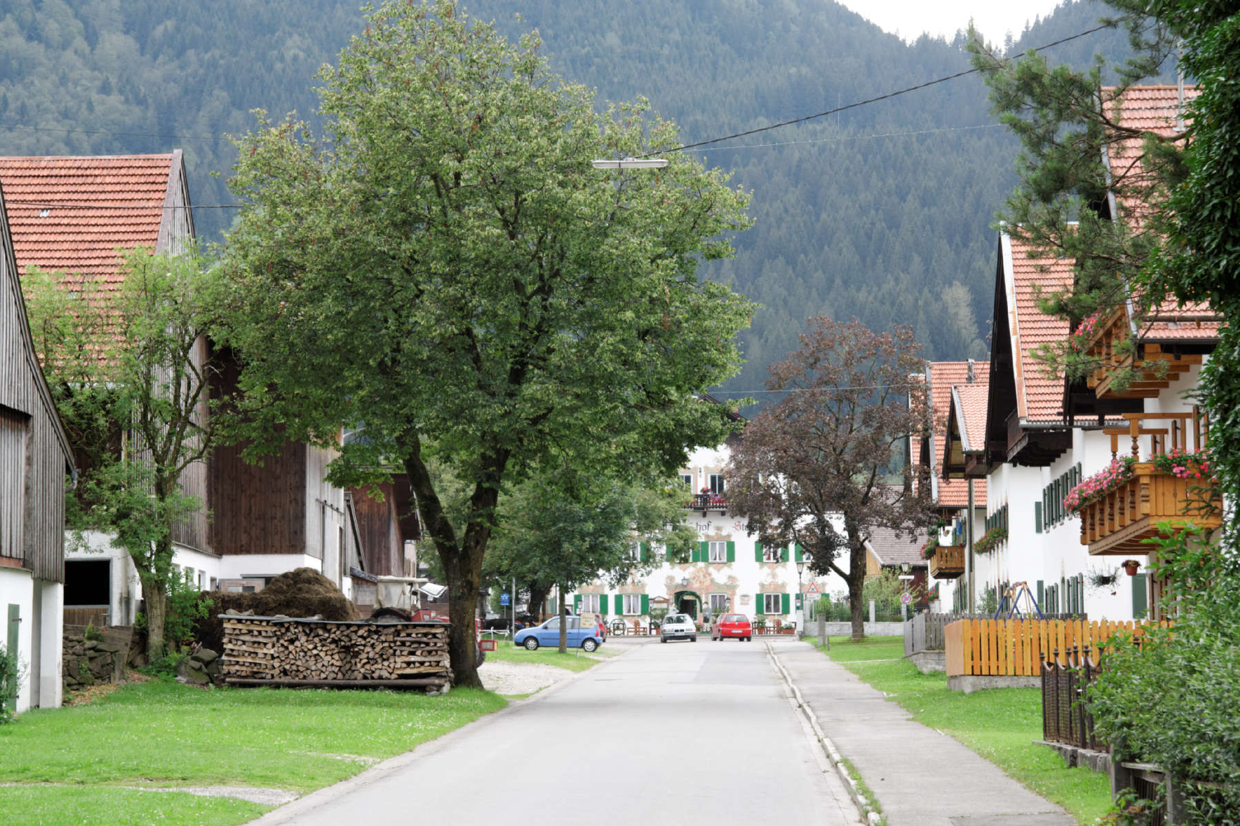 Unterammergau, Pürschlingstraße im denkmalgeschützten Ensemble Hinterdorf, Blick von Osten mit dem Gasthof Stern als optischem Abschluss